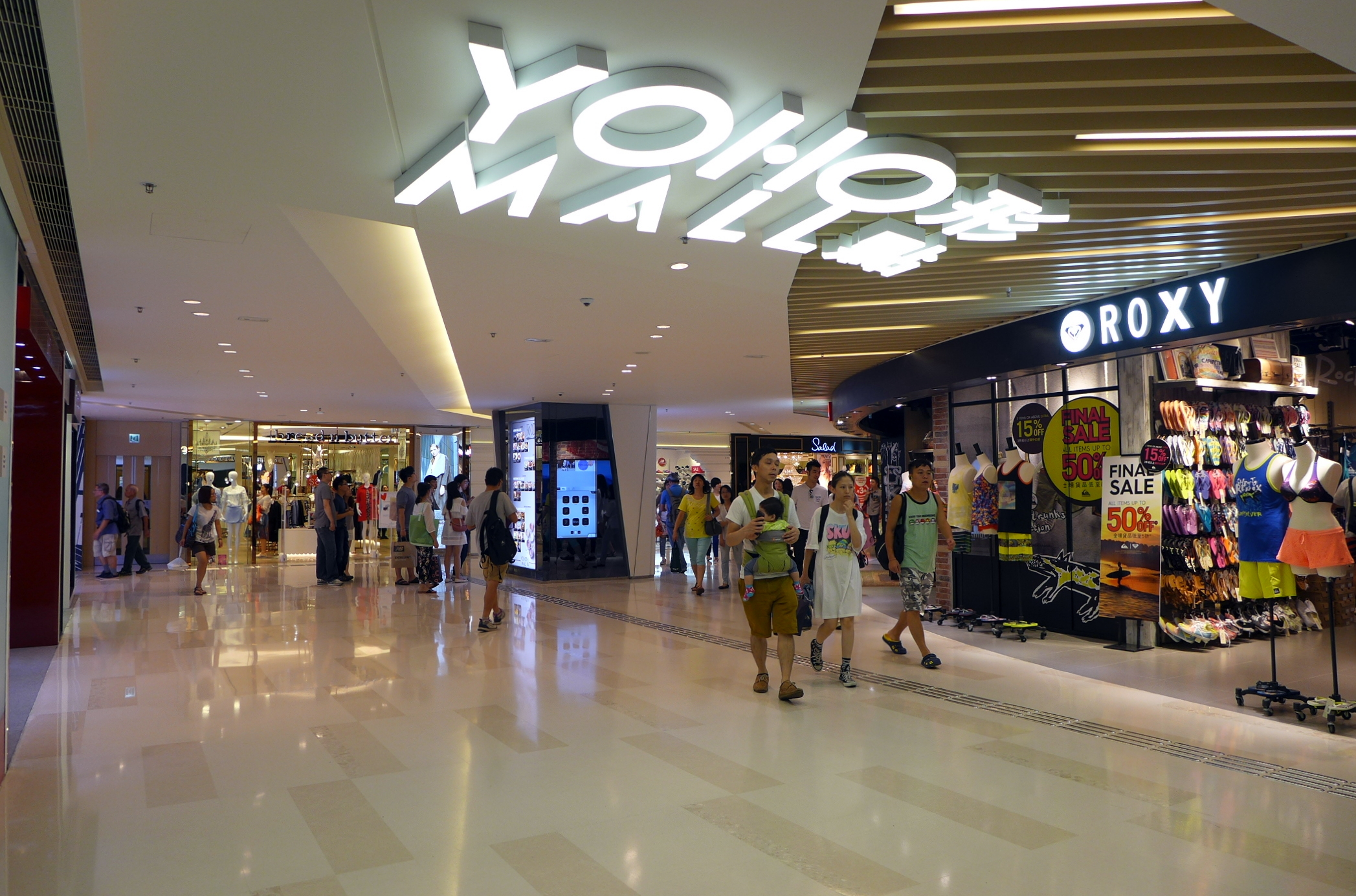 YOHO Mall II Entrance